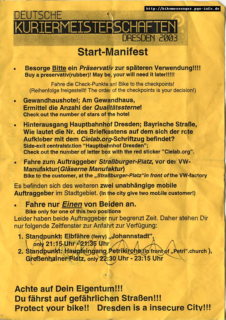 Manifest der Deutschen Kuriermeisterschaft DKM 2003 in Dresden